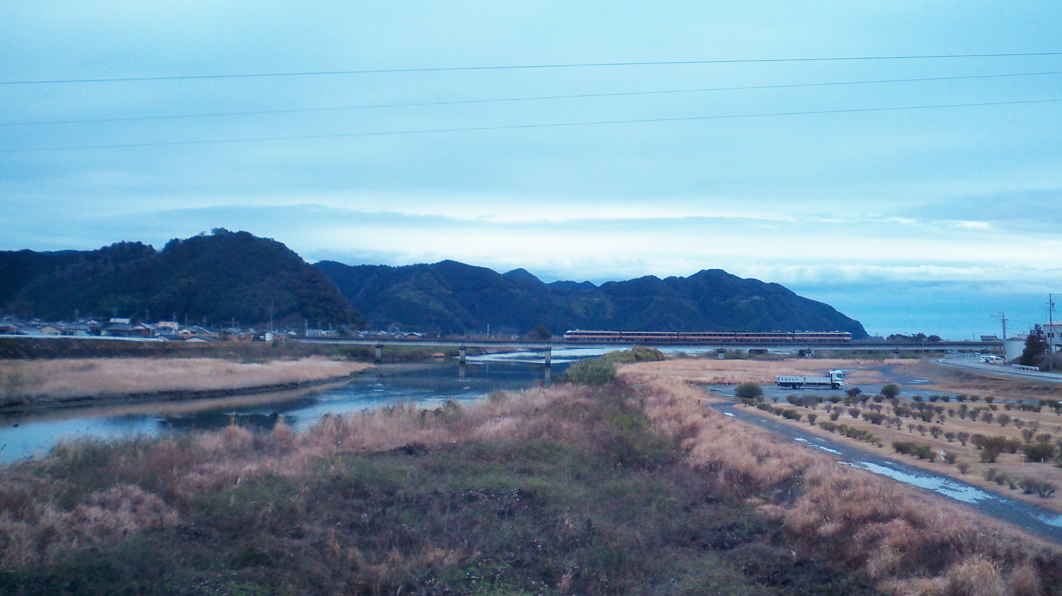 三重県北牟婁郡紀北町海山区相賀に国道42号から望むJR東海紀勢本線銚子川橋とキハ85系気動車。